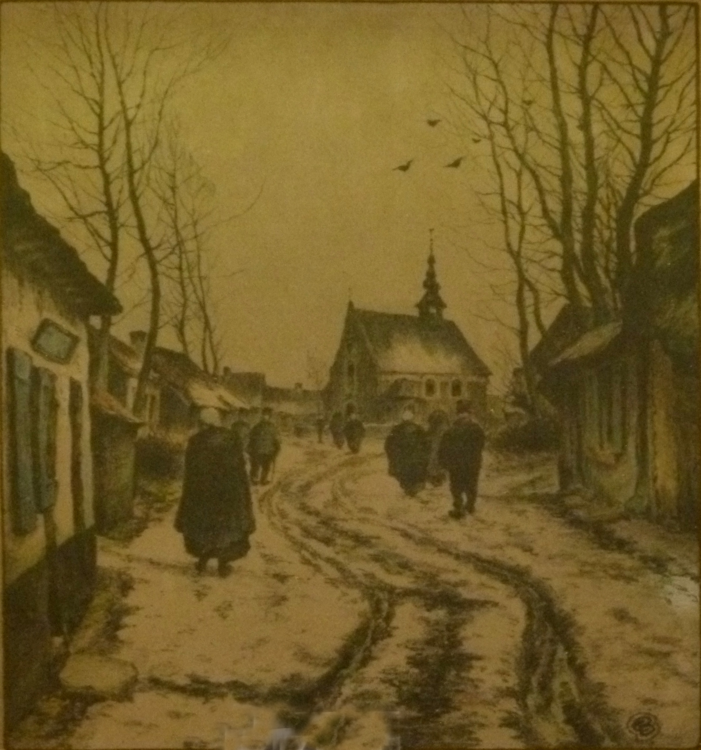 "Kerstdag in de Kempen", gekleurde litho (1938) door de Belgische kunstschilder Edgar Bytebier (1875-1940)